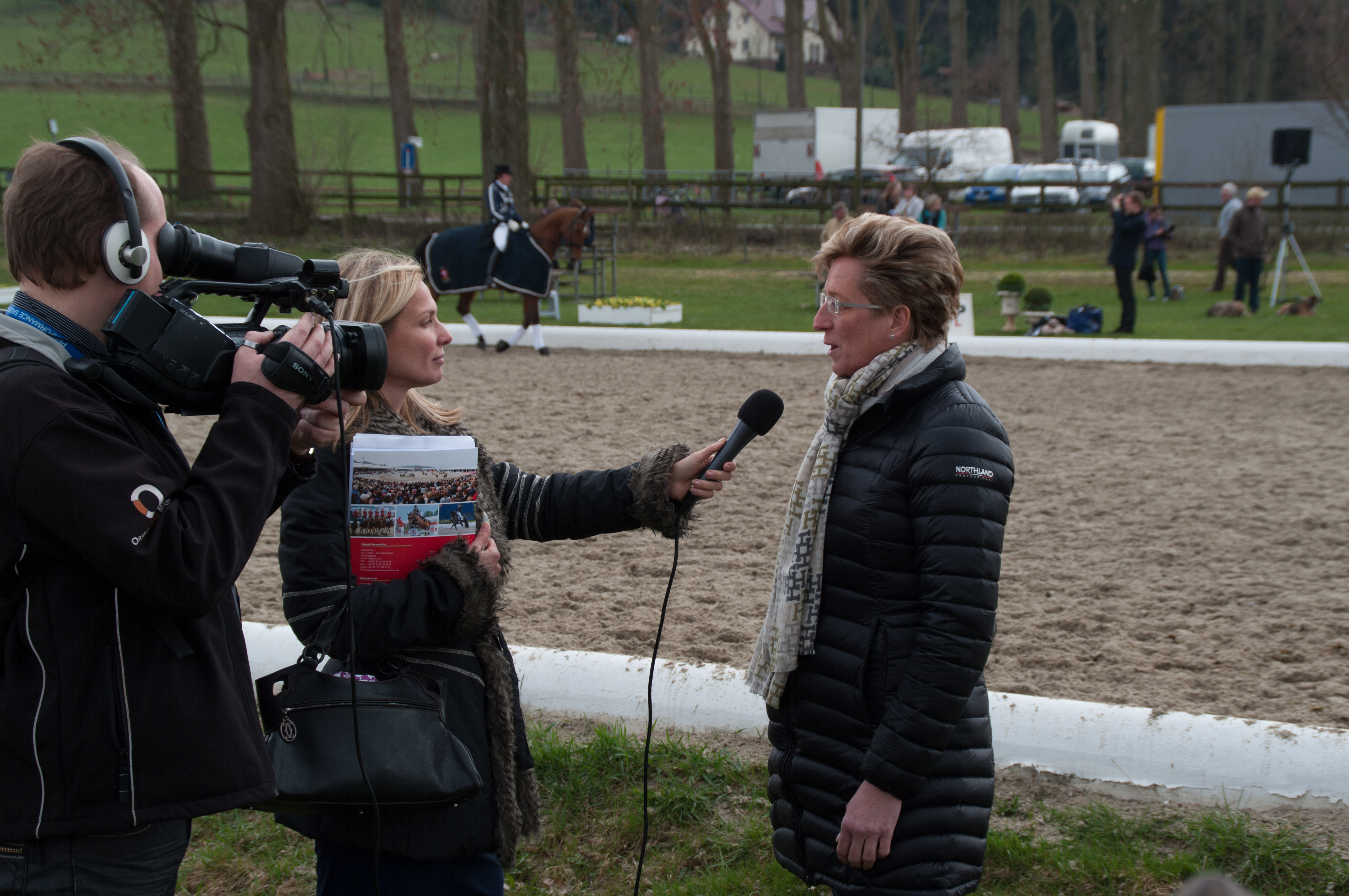 Horses & Dreams 2013: Heike Kemmer im Interview